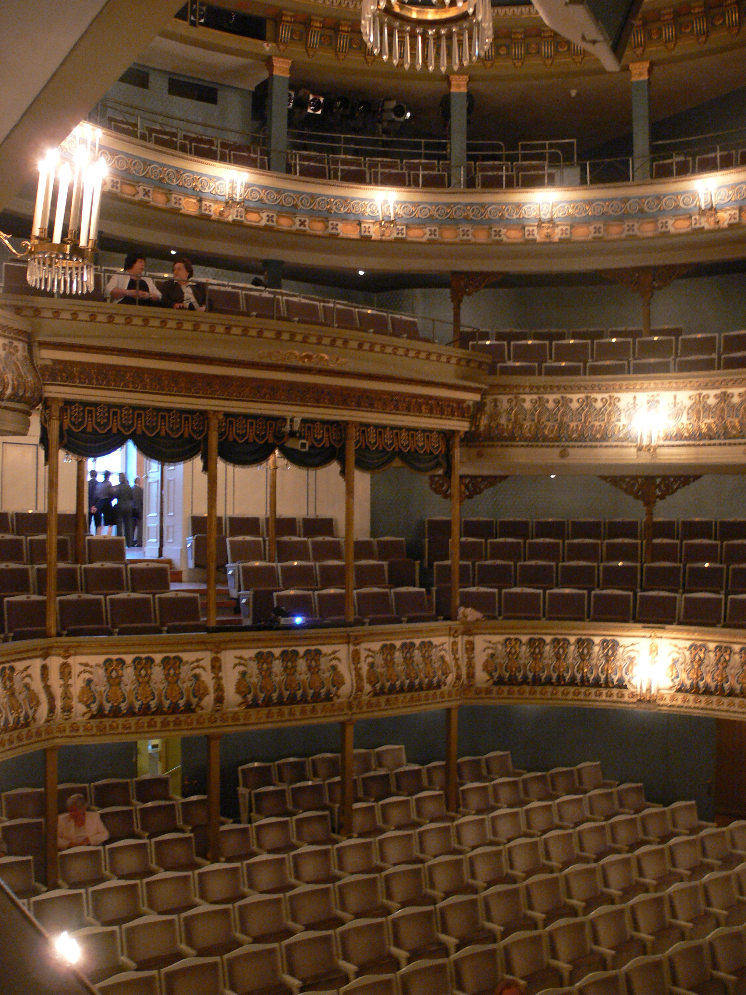 Landestheater Coburg Zuschauerraum